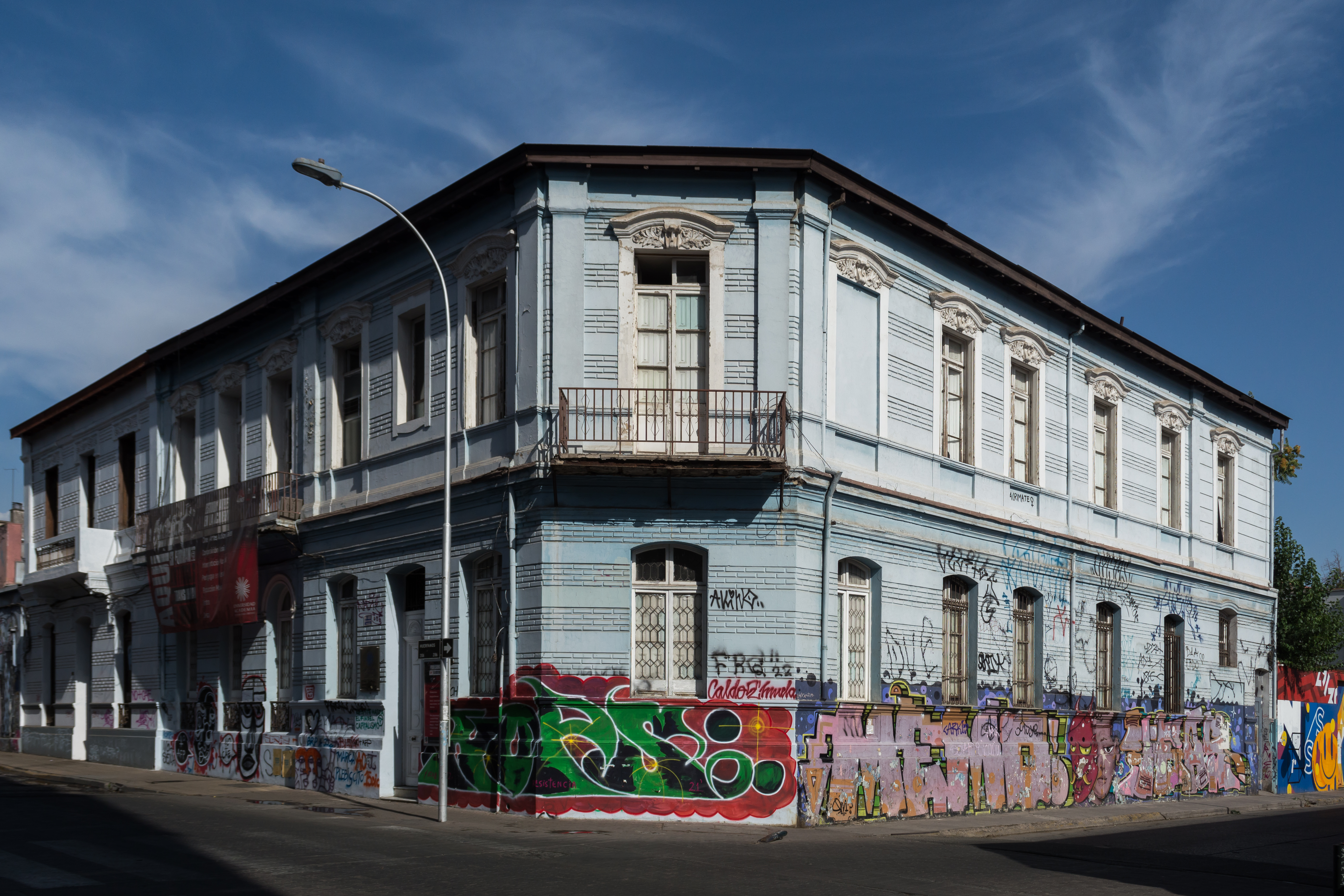 Casa Arrau, Santiago, Región Metropolitana, Chile